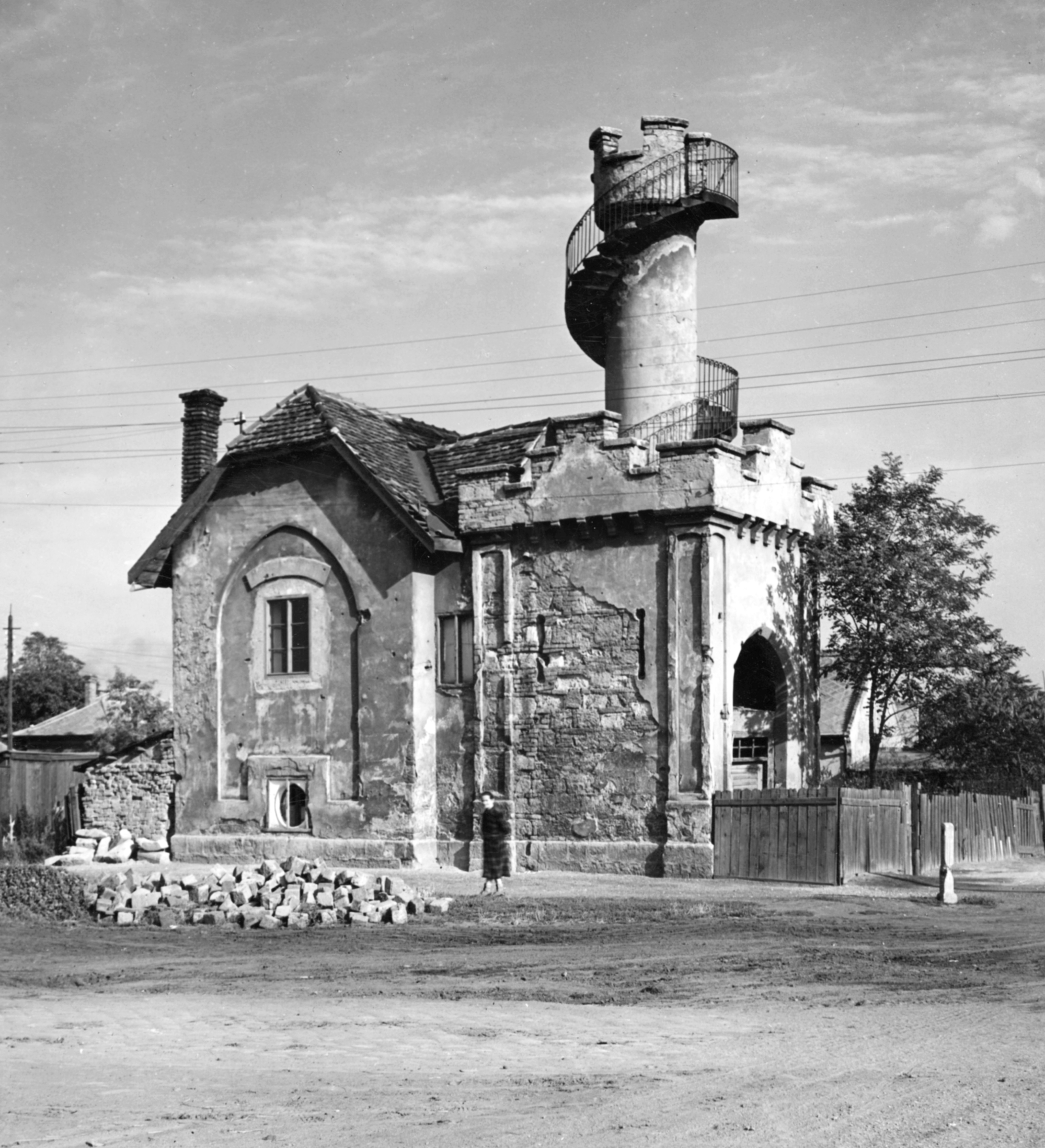 Harmat utca 31. Csősztorony. Location: Hungary, Budapest X. Tags: street view, stairs, Budapest Title: Harmat utca 31. Csősztorony.